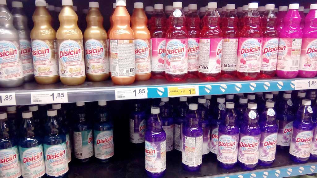 Disiclin en Eroski.